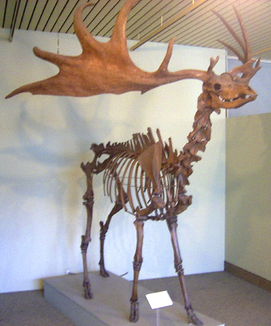 Skelett eines Megalocerus giganteus im Überseemuseum Bremen gefunden in einem Torfmoor in Irland.